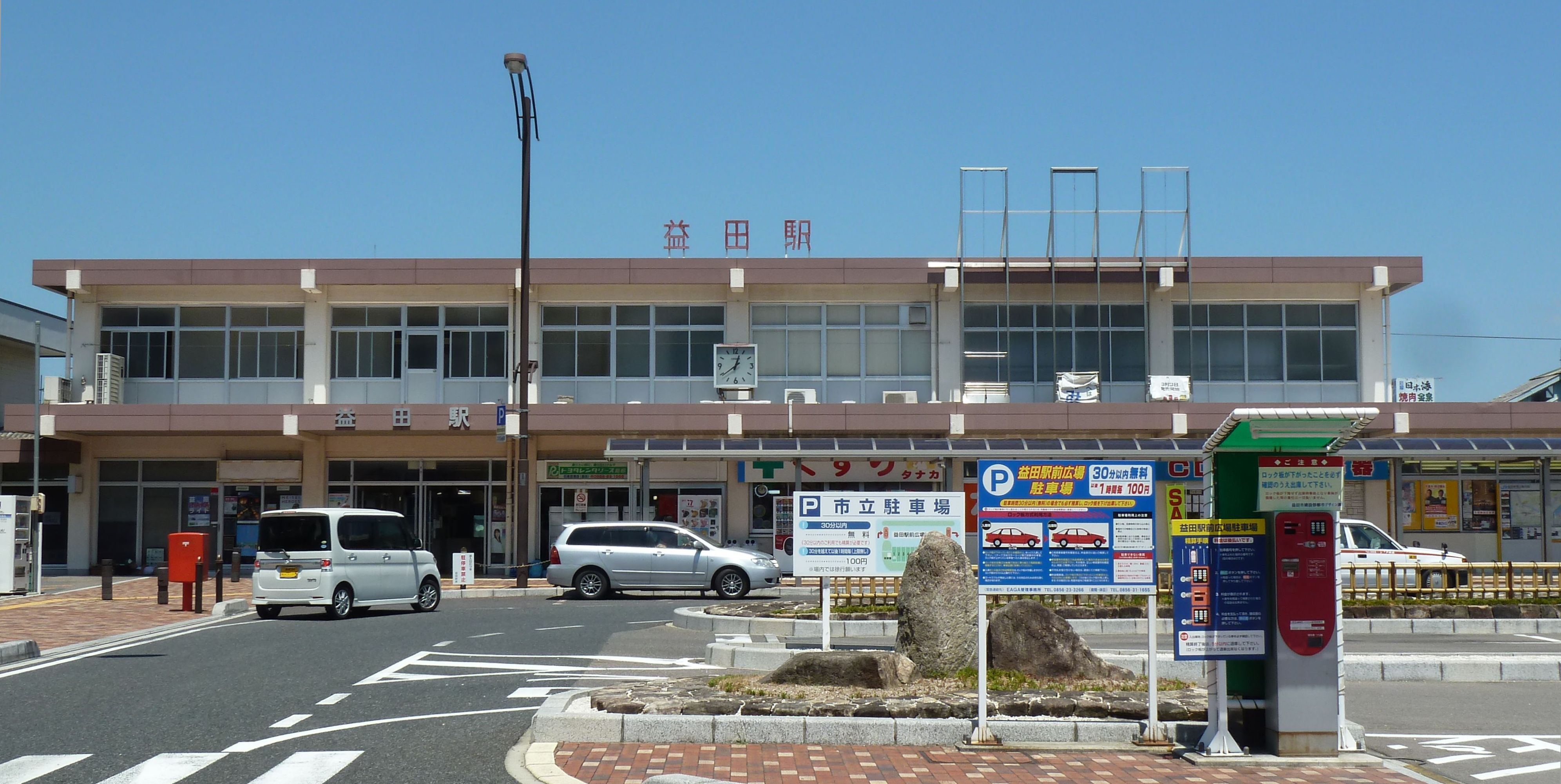 益田駅の駅舎